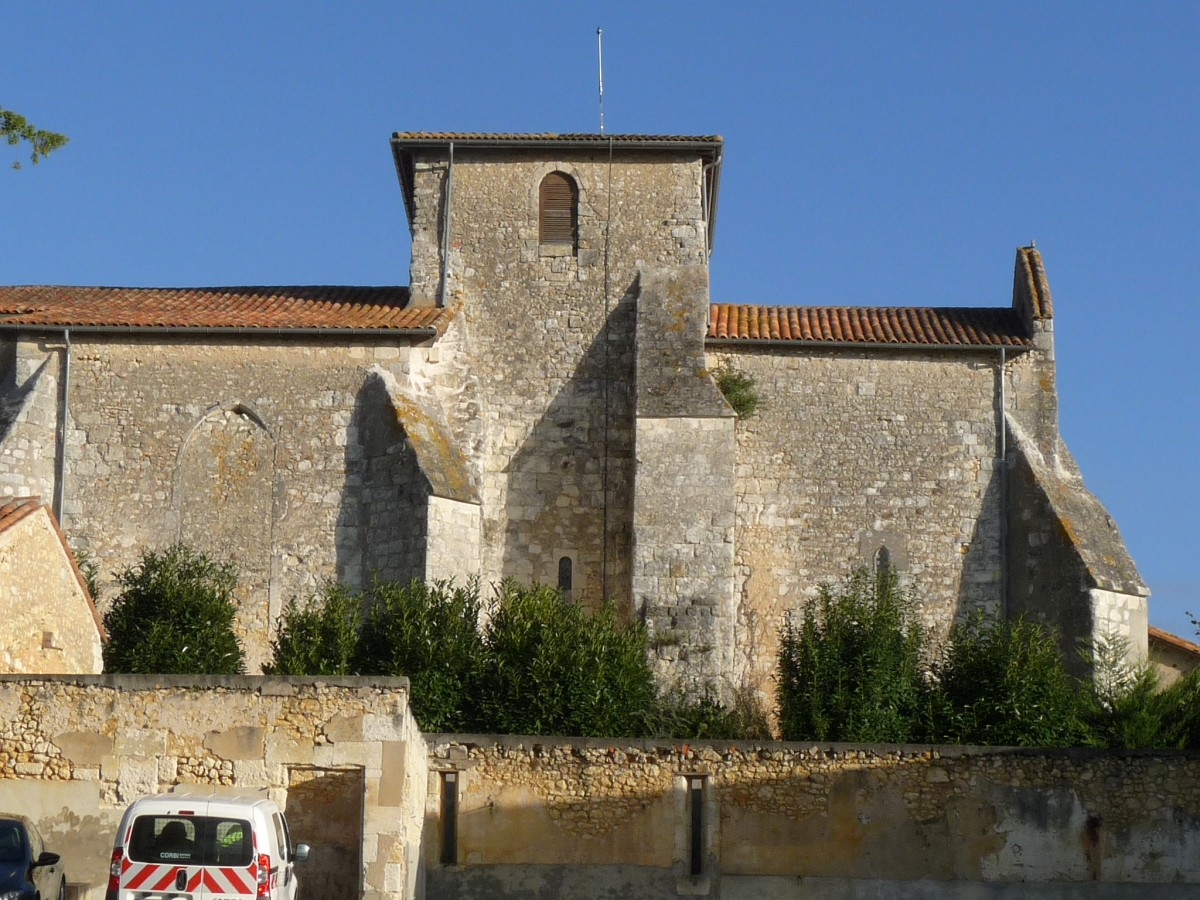 Eglise d'Orignolles, Charente-Maritime, France